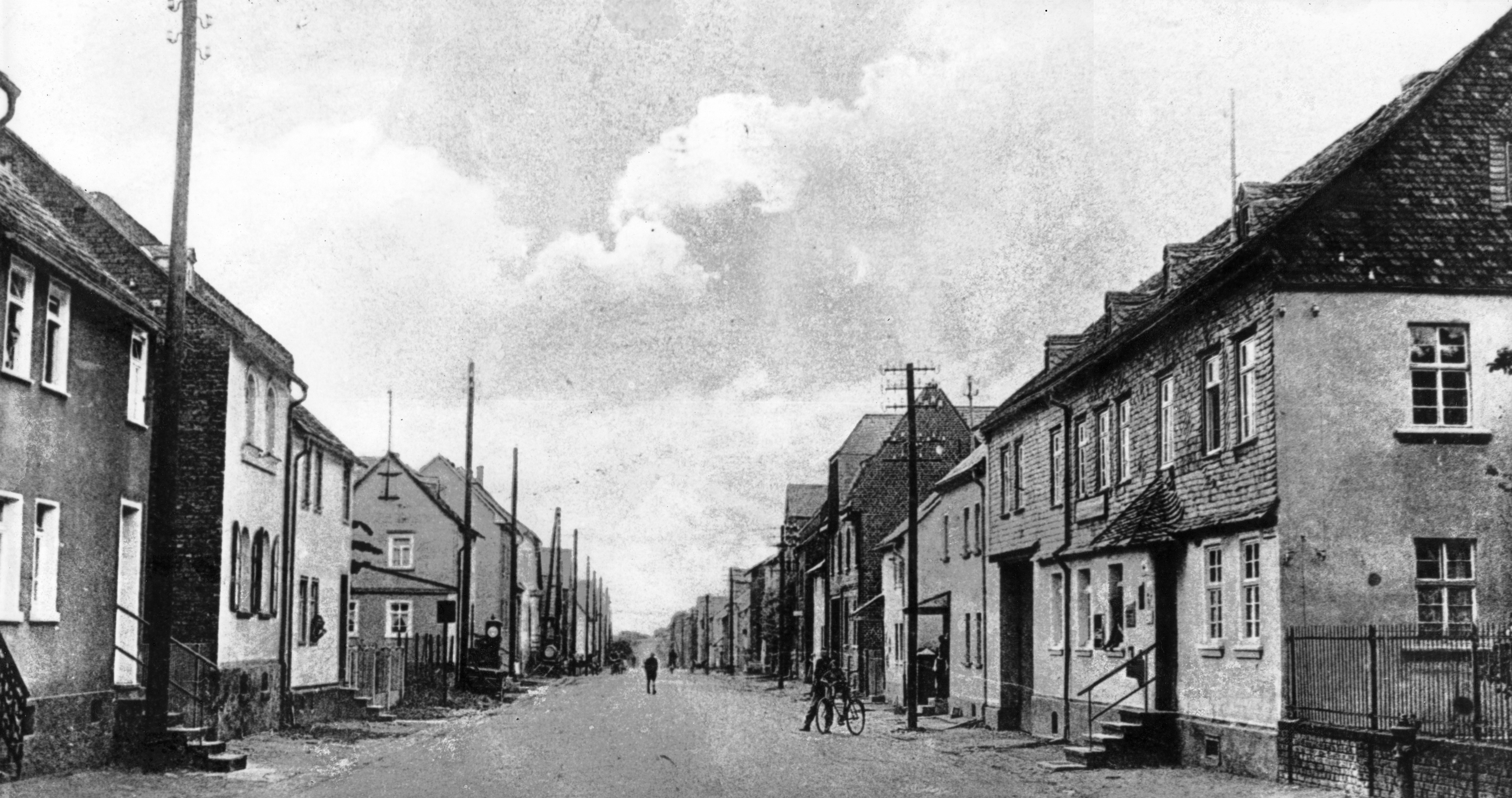 Hauptstraße in Limburg-Linter ca. 1935. (Laut Aussage des Wirts, in dessen Gastraum das Foto seit vielen Jahren hängt). Wer der Fotograf war, lässt sich leider nicht mehr herausfinden.